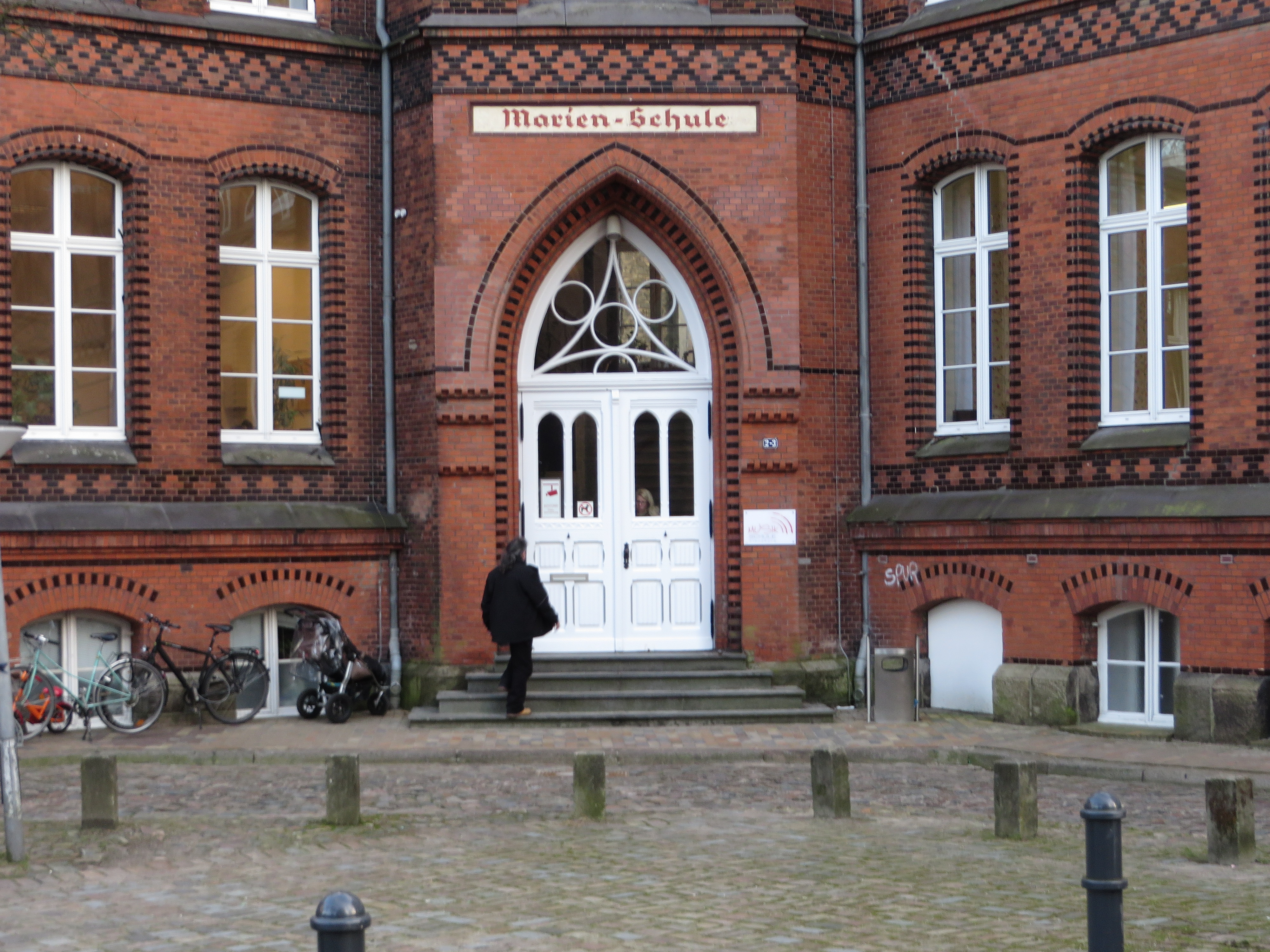 Marien-Schule (Flensburg Februar 2015), Bild 01